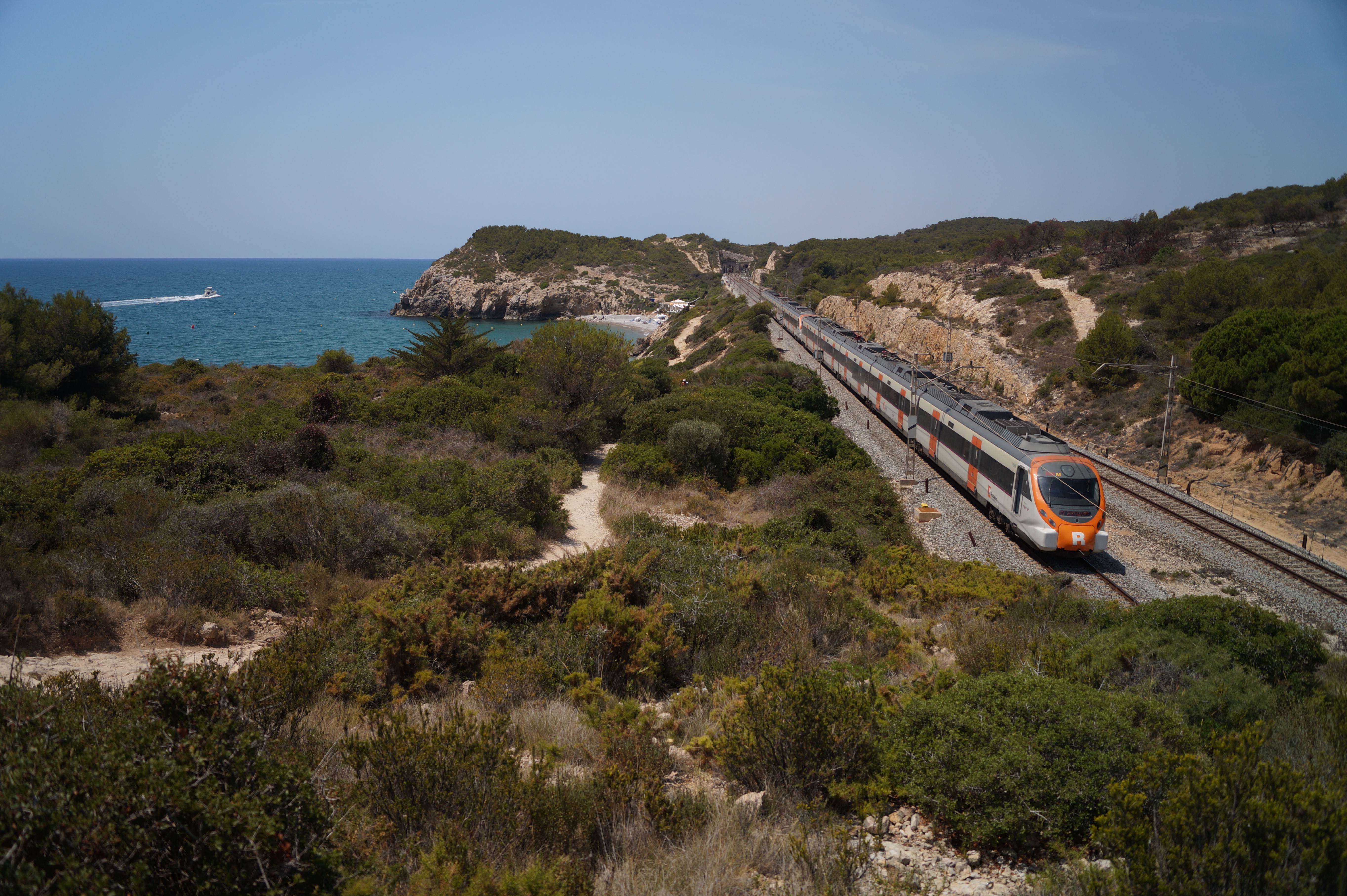 Serie 465 cerca Vilanueva y Geltrú